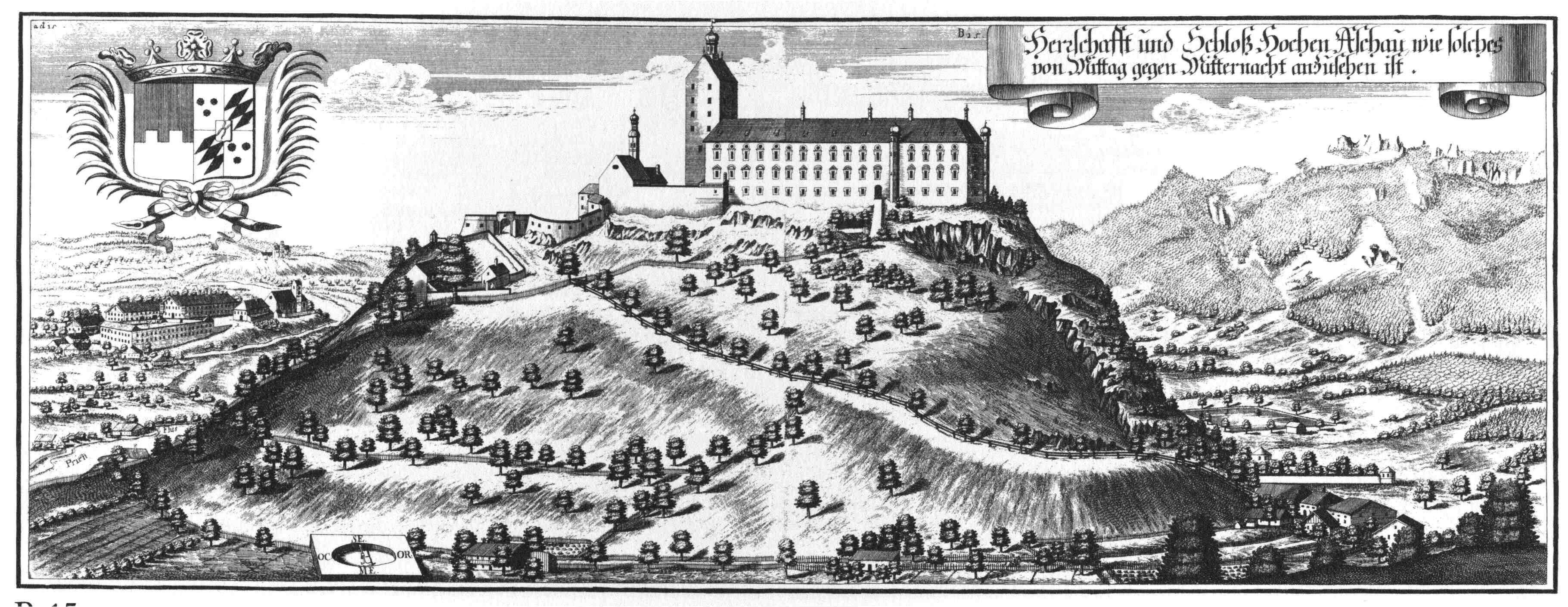 Schloss Hohenaschau nach einem Kupferstich von Michael Wening von (1721)